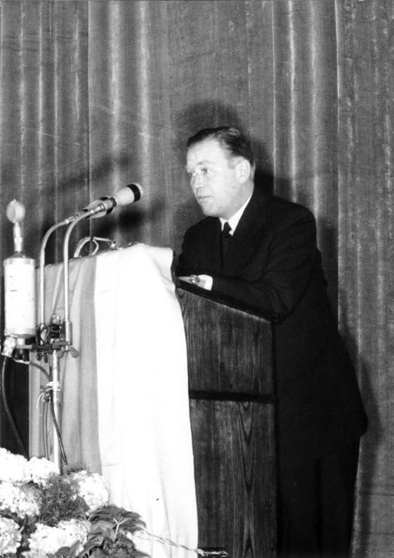 Zentralbild/Heilig 11.8.1954 Dr. Otto John sprach vor der Internationalen Presse Am Mittwochvormittag, dem 11. August 1954, legte der ehemalige Präsident des Bundesamtes für Verfassungsschutz, Dr. Otto John, vor den Pressevertretern des In- und Auslandes die Gründe dar, aus denen er mit der Politik der Adenauer-Regierung gebrochen hat. UBz: Dr. Otto John bei seinen Ausführungen.